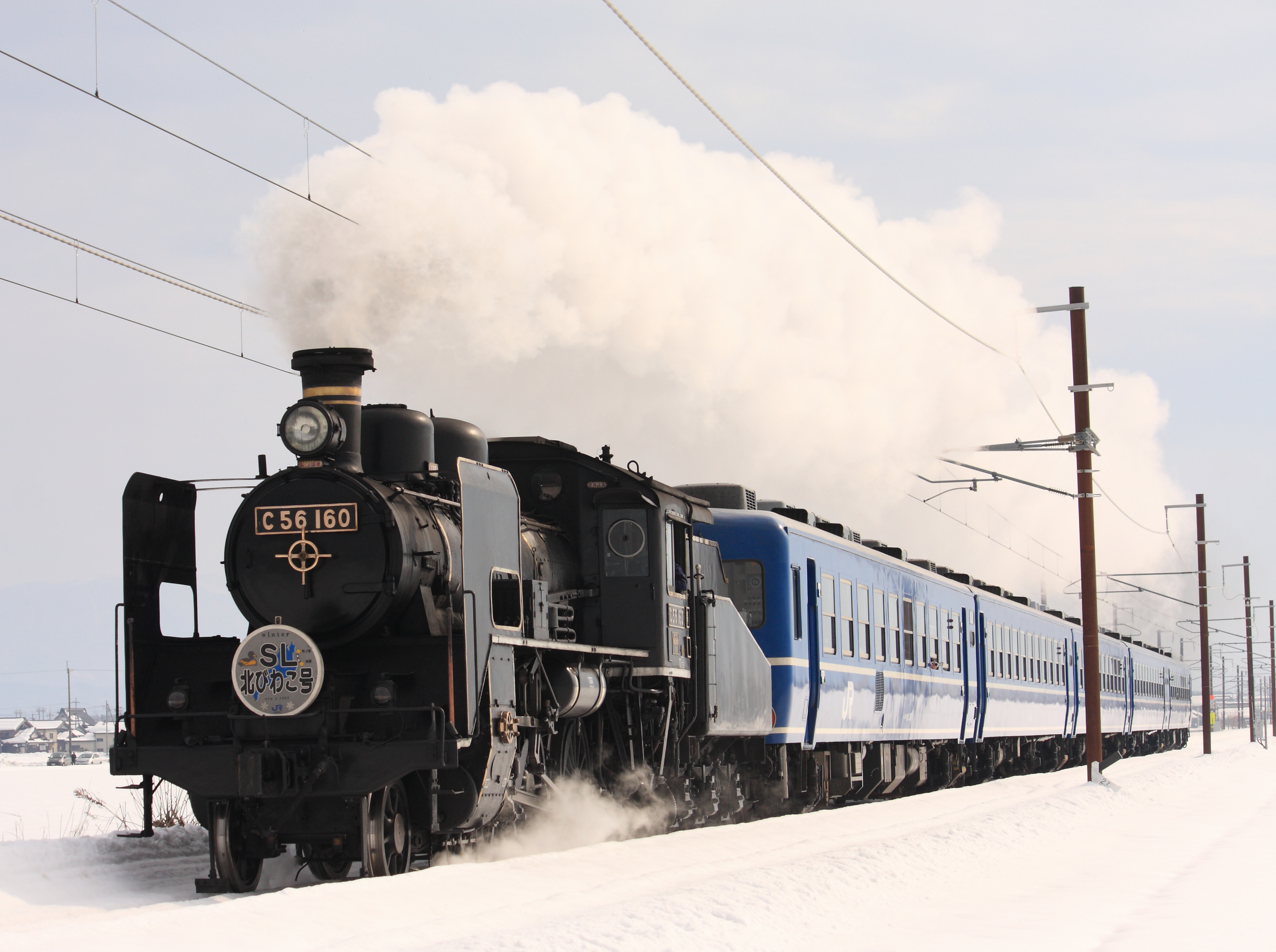 JR西日本C56形蒸気機関車160号機と12系客車（5両編成）